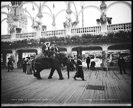 Elefantenritt als Fahrgeschäft im Lunapark auf Coney Island, New York.